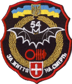 Нарукавний знак, 54 окремий розвідувальний батальйон